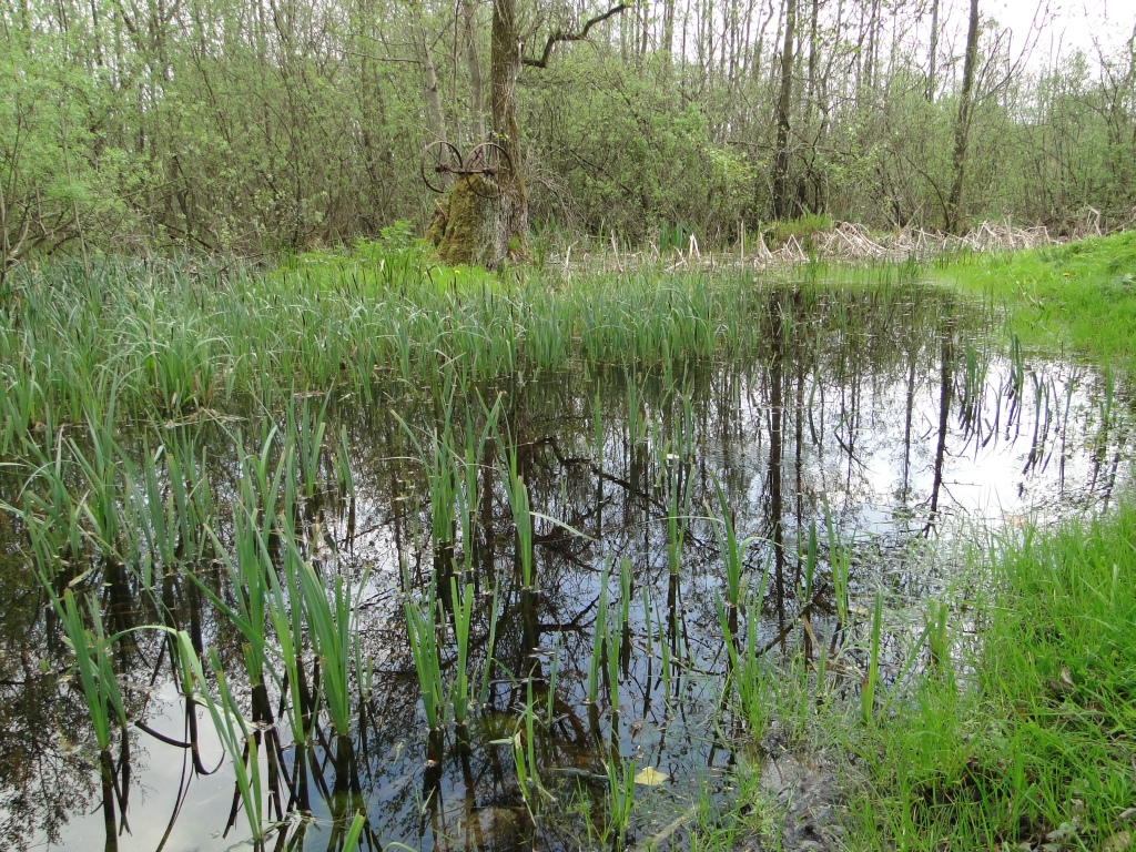 Naturschutzgebiet Upahler und Lenzener See, südlich Güstrow, in Mecklenburg-Vorpommern. - OpenStreetMap(Info)